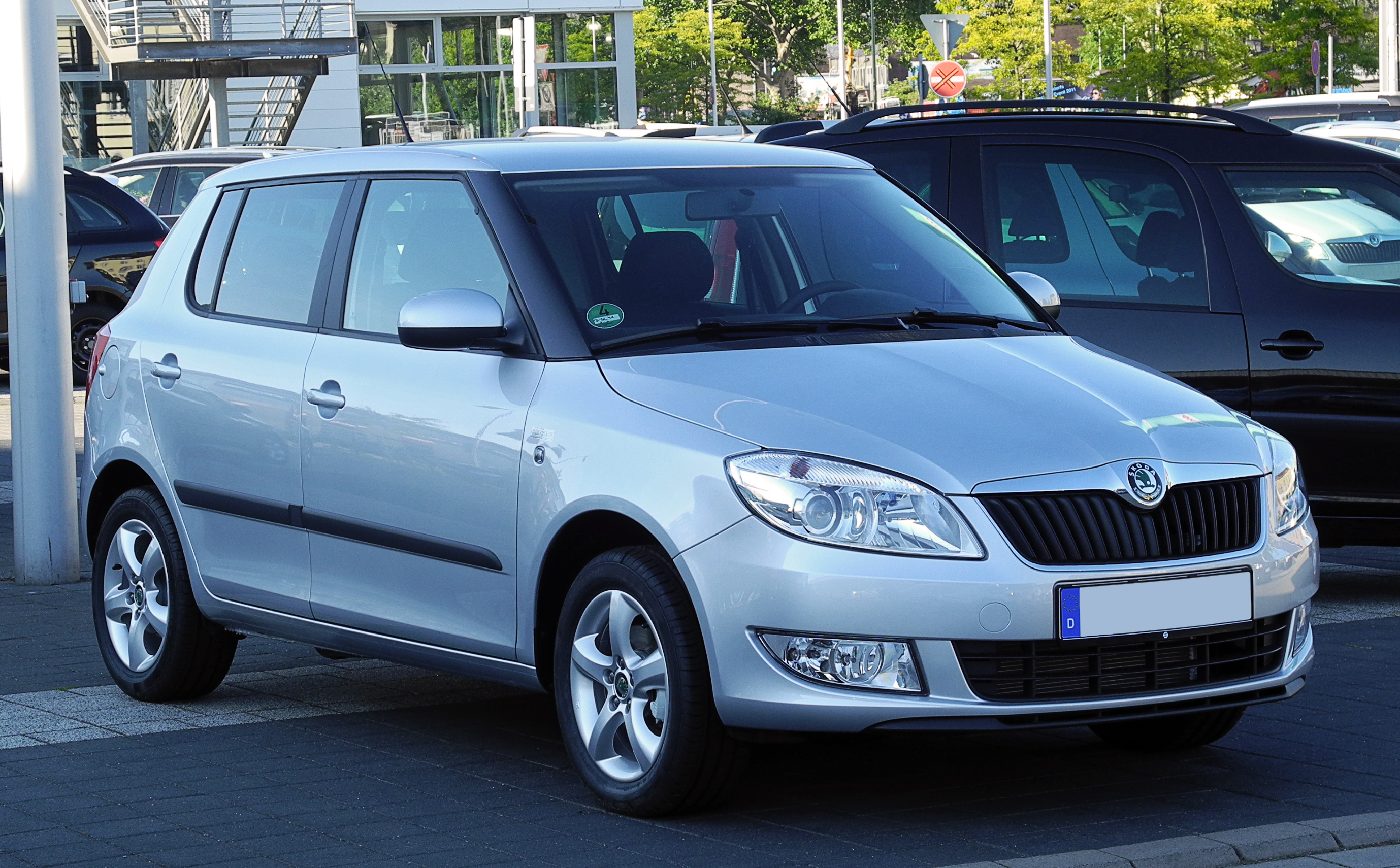 Skoda Fabia Familiy (II, Facelift)